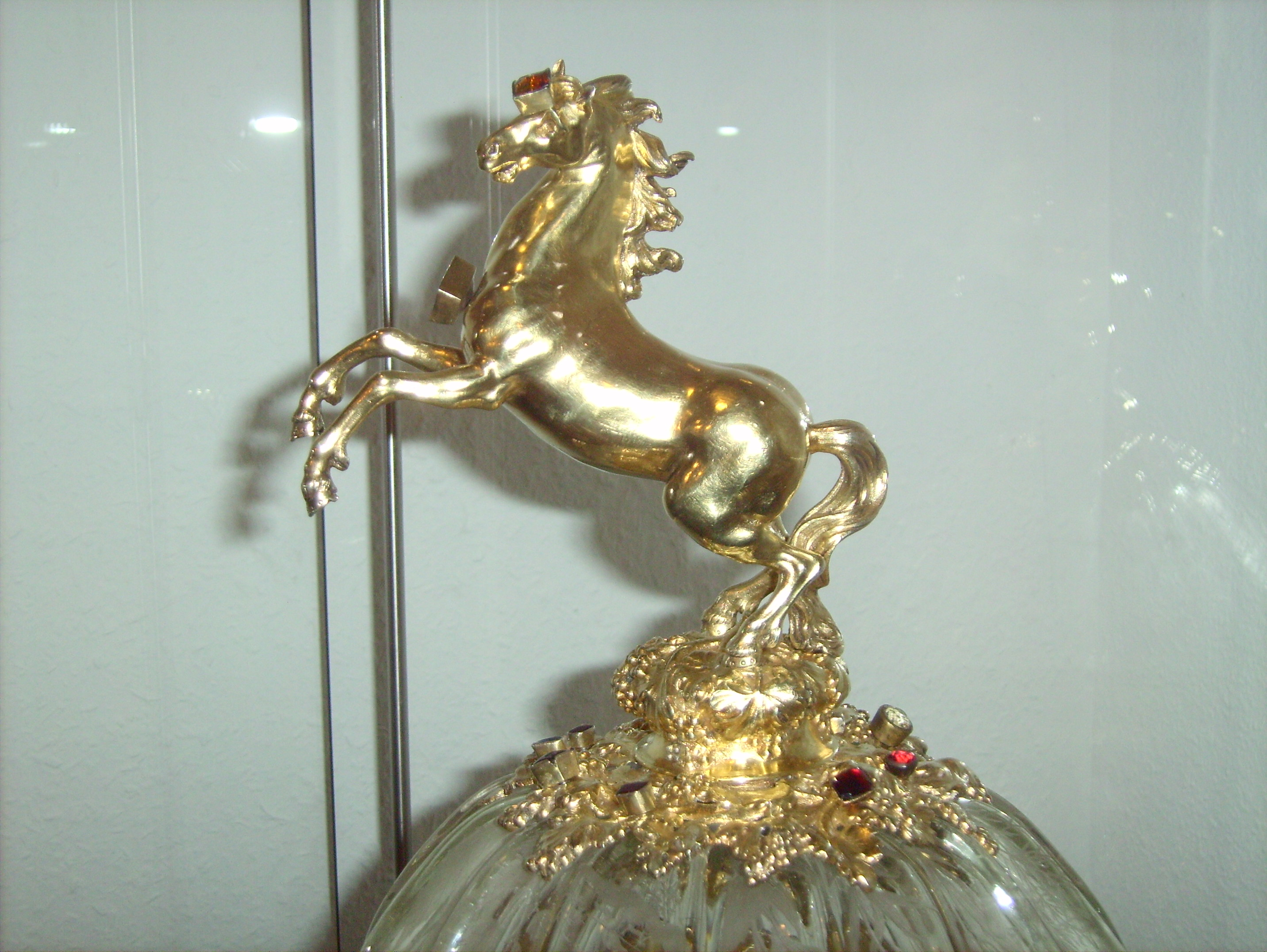 Westfalenross auf dem Deckel des Westfälischen Landständepokals